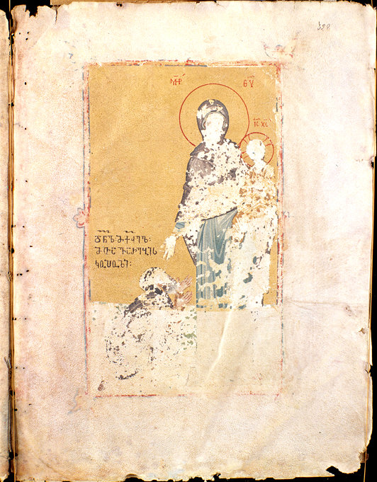 ერთ–ერთი მინიატიურა მოქვის ოთხთავიდან